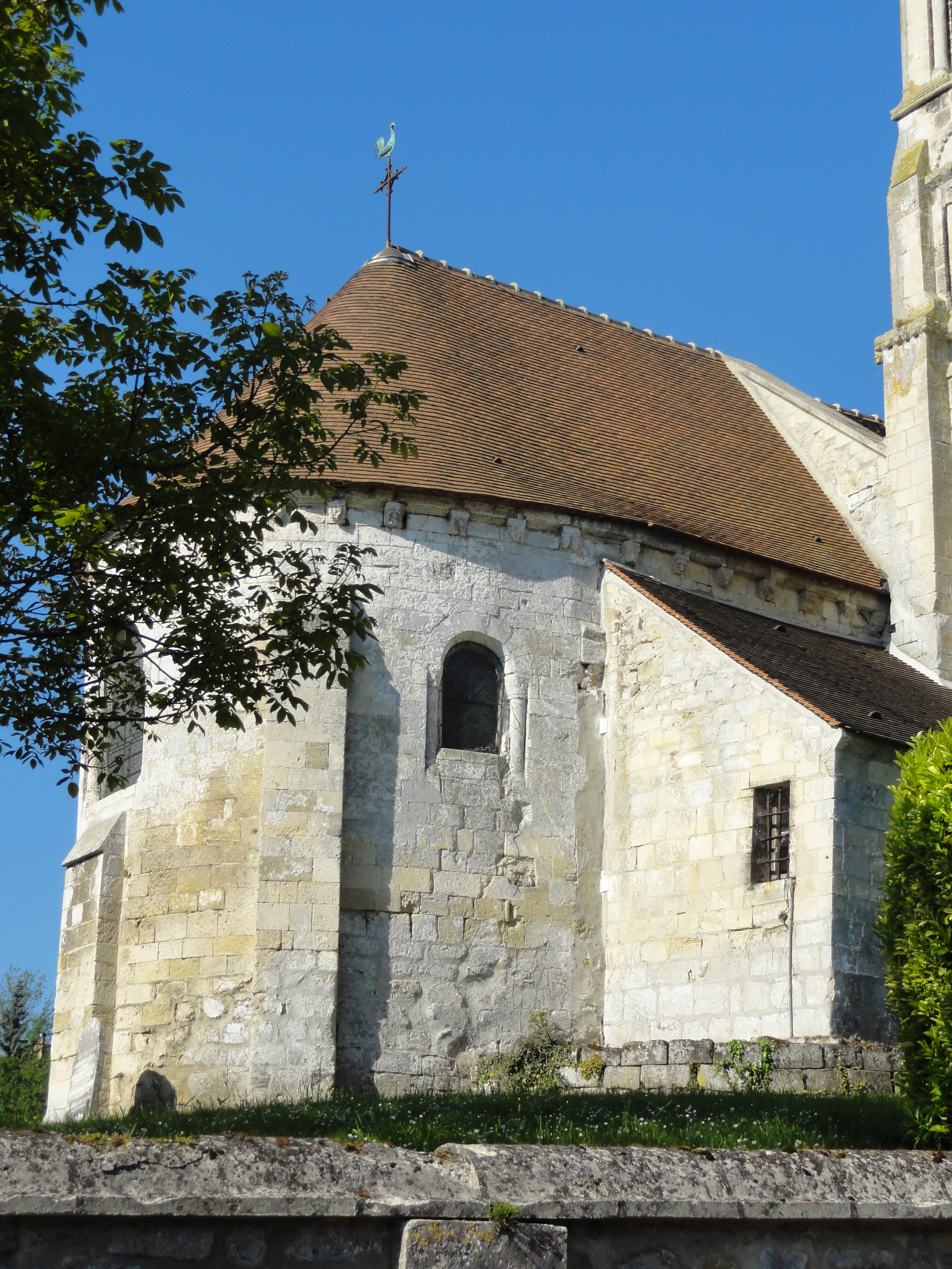 Chœur, vue depuis le nord.